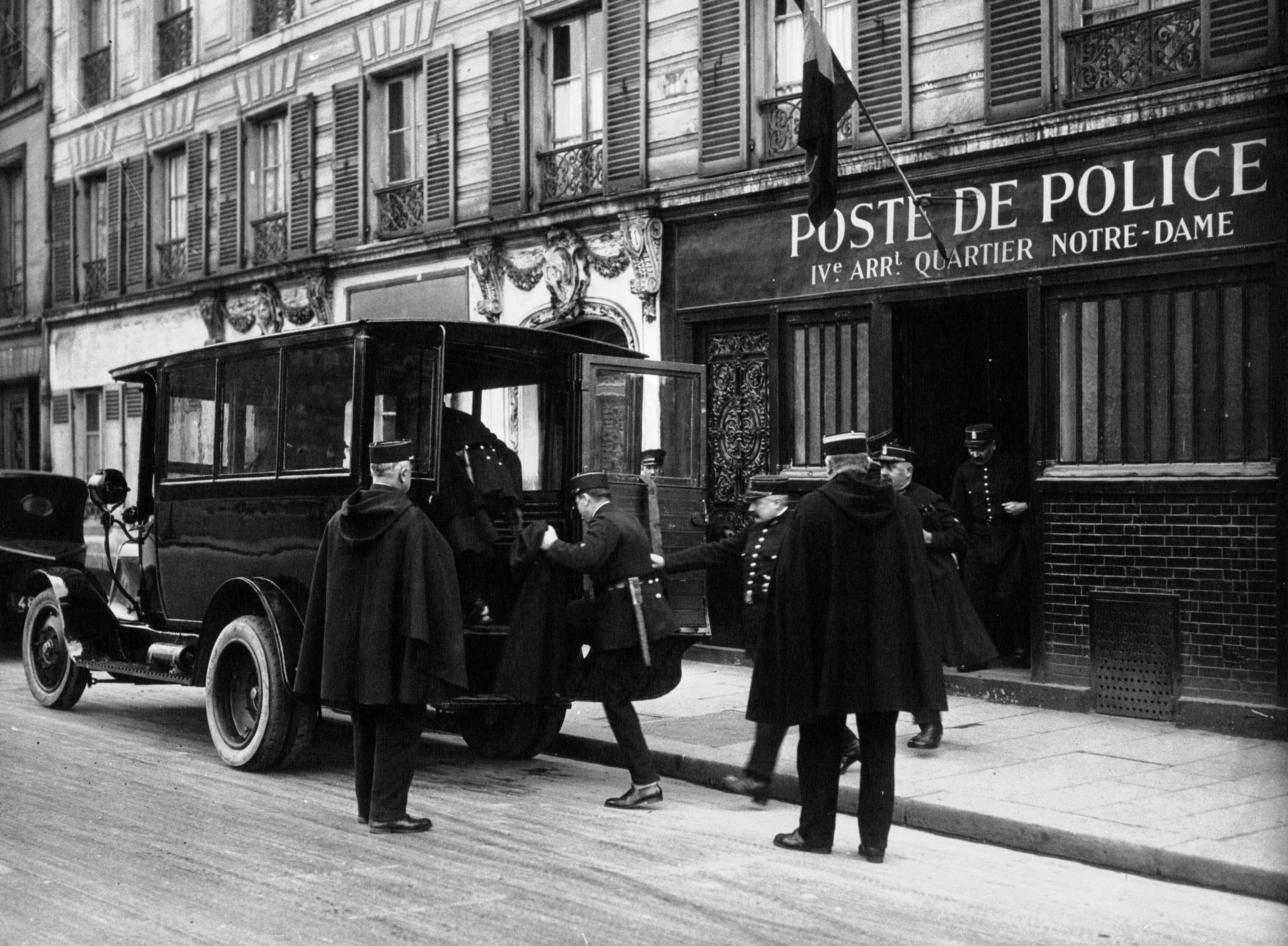 Poste de police dans le quartier Notre-Dame à Paris en 1928. Actuel 11 Quai aux fleurs.